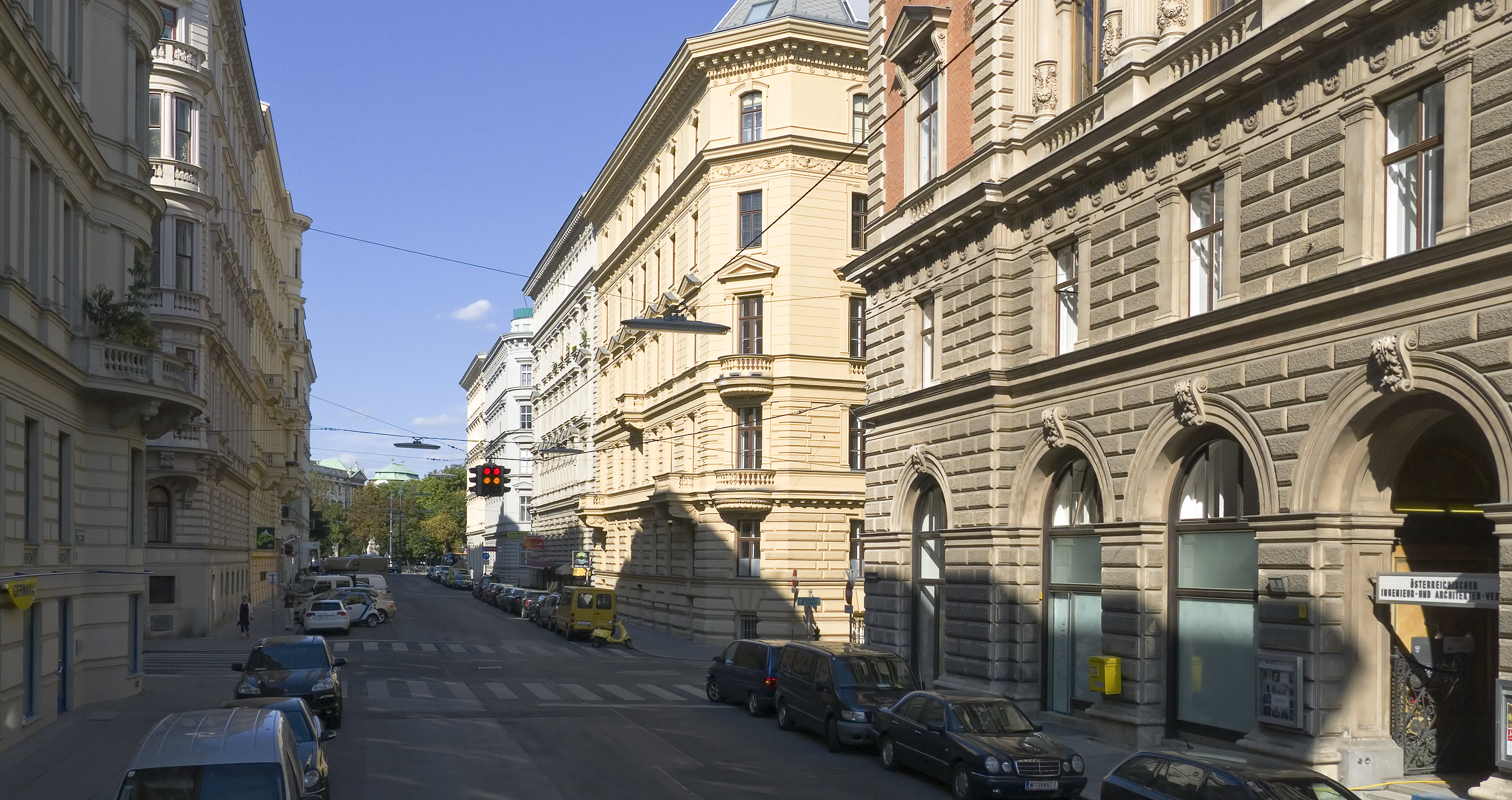 Eschenbachgasse in Wien 1 bei Nr. 11 Richtung Nordosten